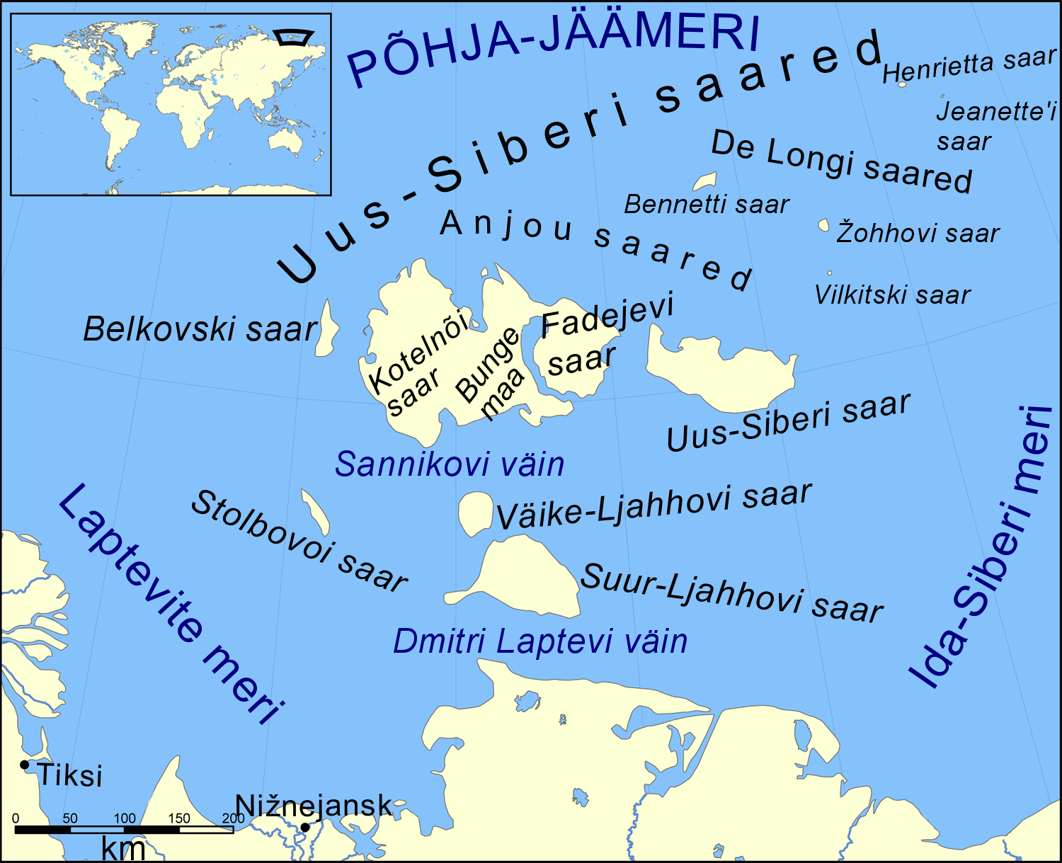 Uus-Siberi saarte kaart